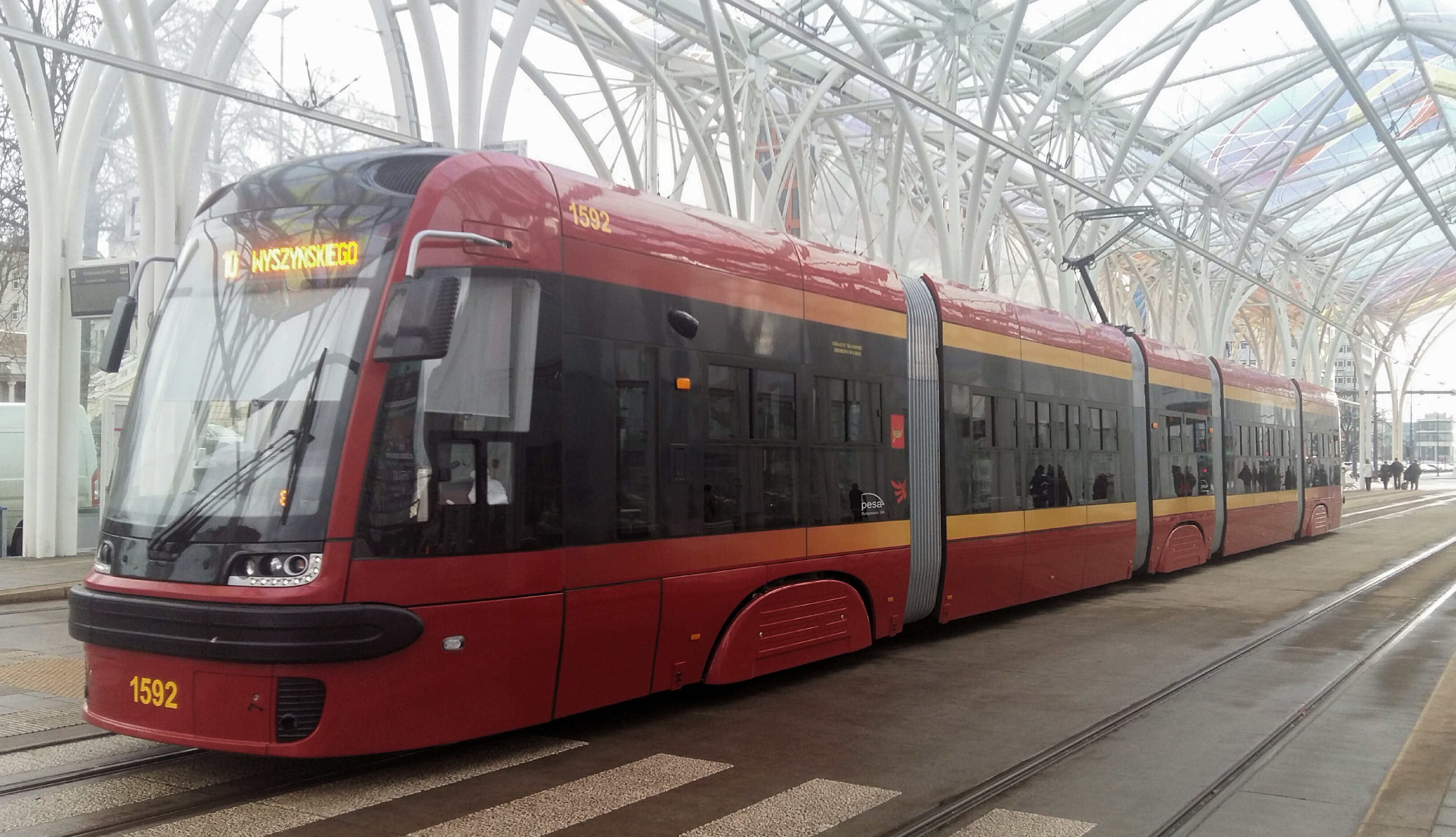 Tramwaje Pesa Swing ma przystanku Piotrkowska Centrum w Łodzi.